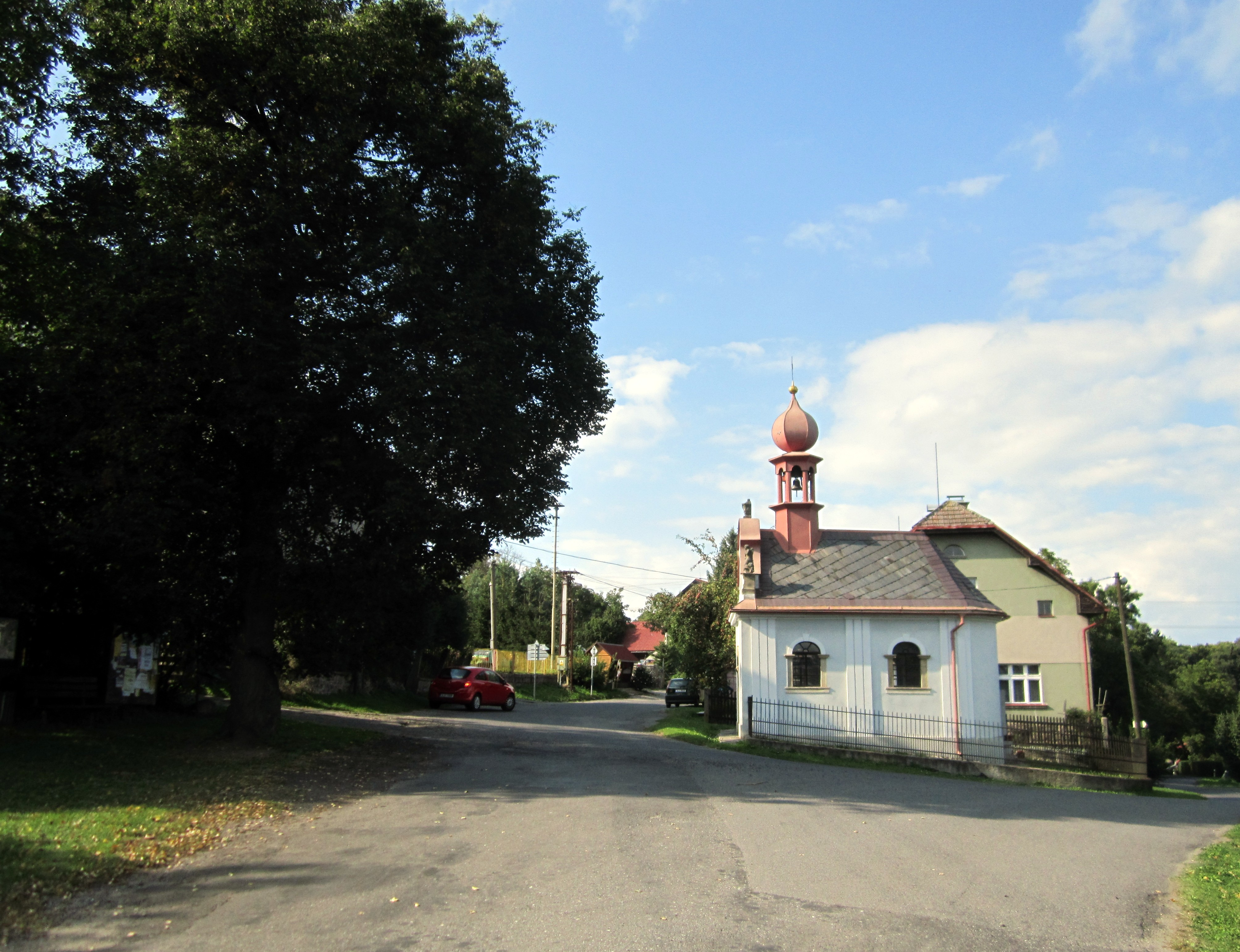 Širší pohled na obec Soběslavice s kaplí.